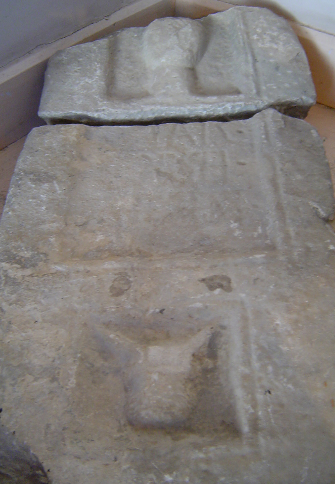 Erromar garaietako aldare akitaniarra, Gauden aurkituta, orain Luchongo museoan. Gaizki irakurtzen da: GELAIS ? / BORSEI ?/ F(ilia) H(ic) S(ita) E(st)